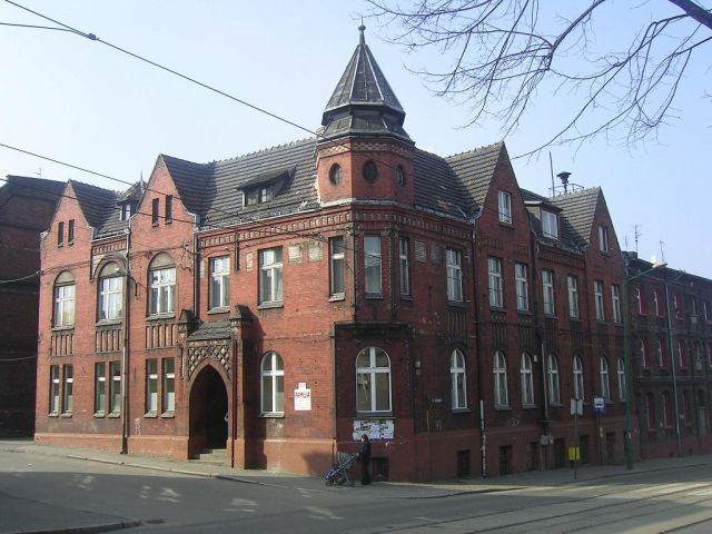 Ratusz w Chropaczowie